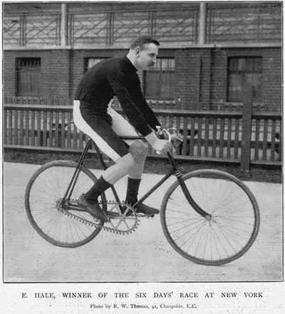 Edward "Teddy" Hale, irischer Radsportler (1864-?)